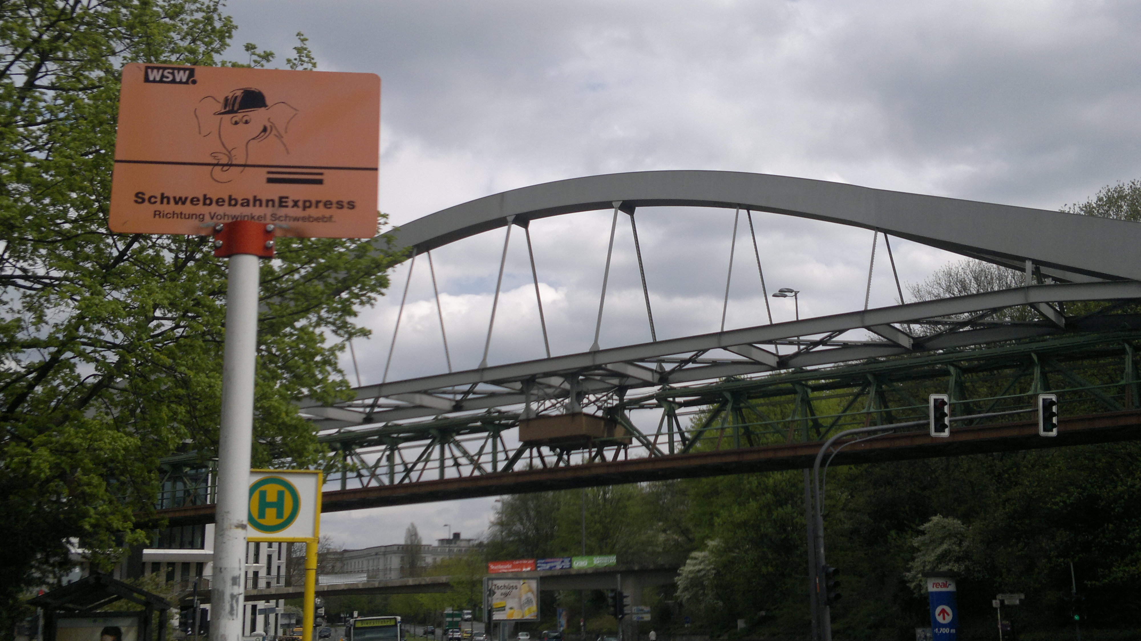 Tuffi ist ein "Markenzeichen" des Wuppertaler Schwebebahn-Expresses; Haltestelle Volkshochschule, im Hintergrund die Schwebebahn